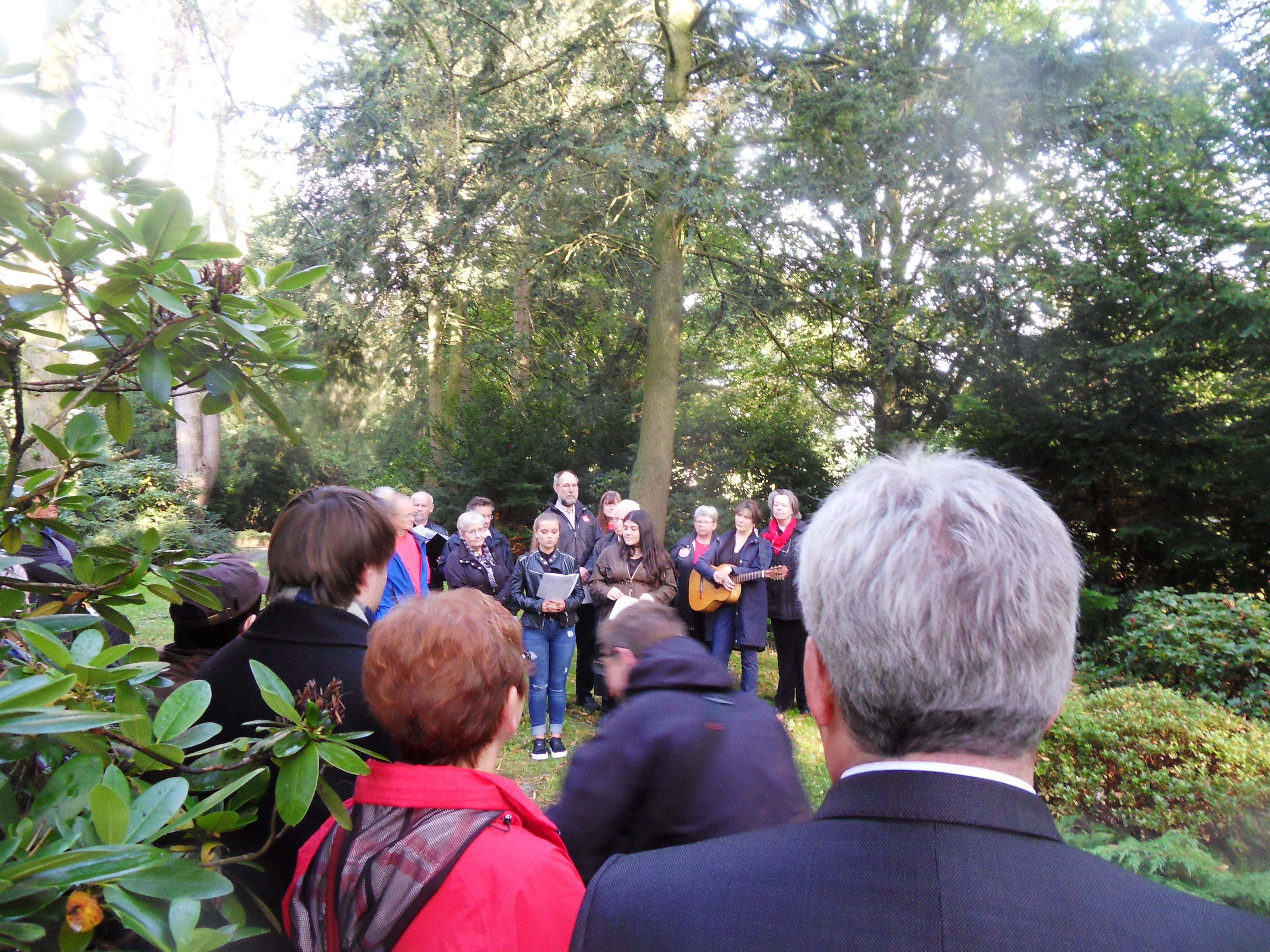 Gedenkverantaltung zum 73. Todestag von Heiko Ploeger auf dem Friedhof Ewigen Frieden in Herford